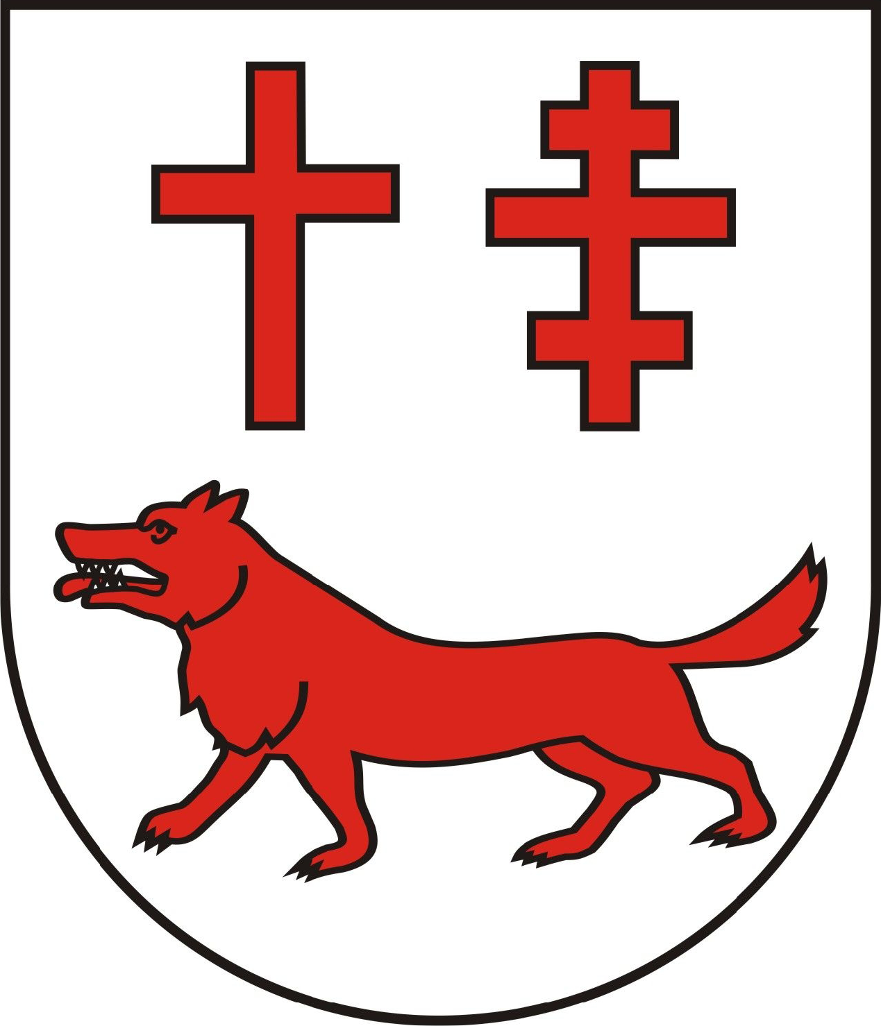 Herb gminy Lelkowo